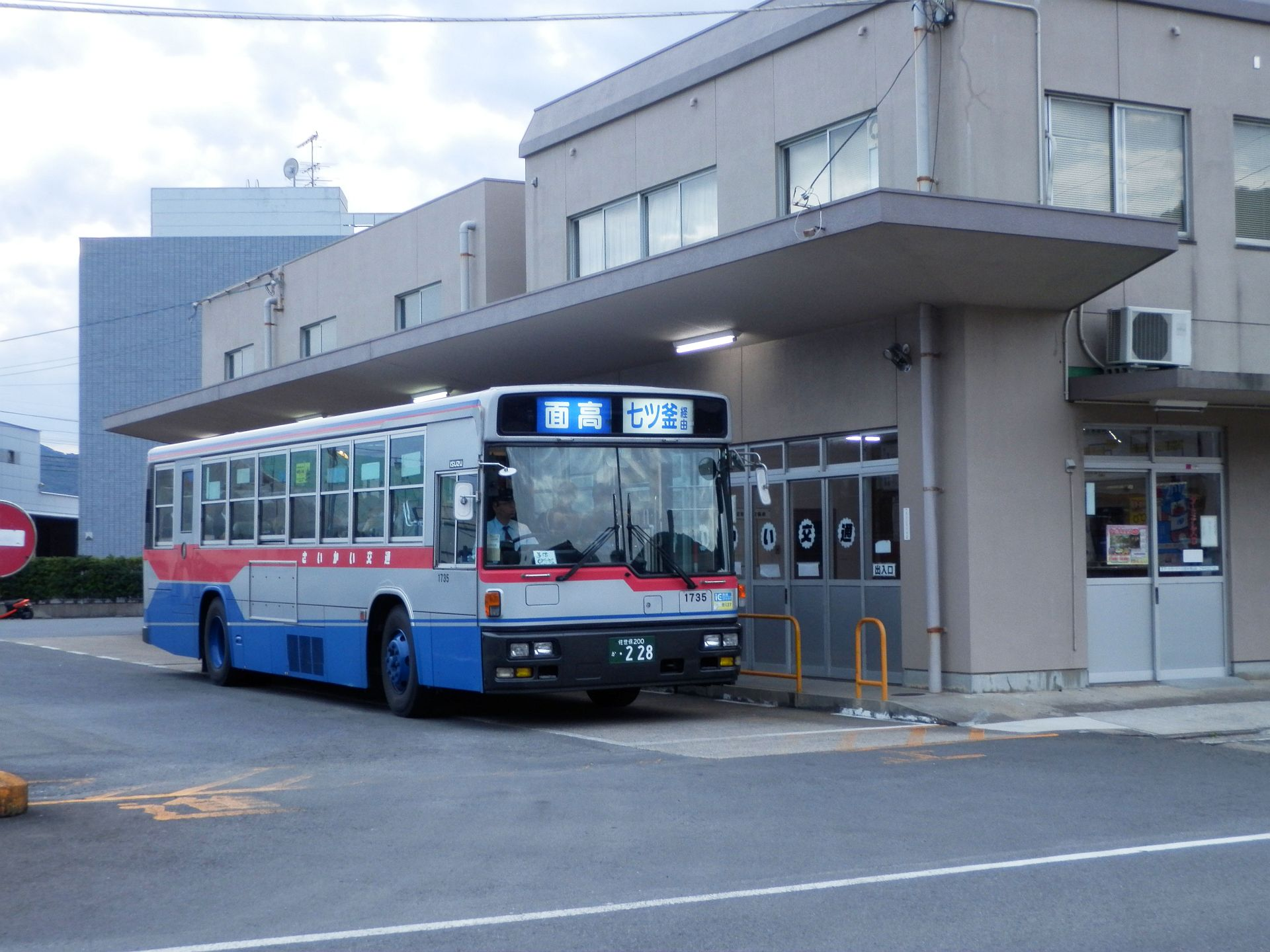 さいかい交通、板の浦本社で乗客を取り扱うバス